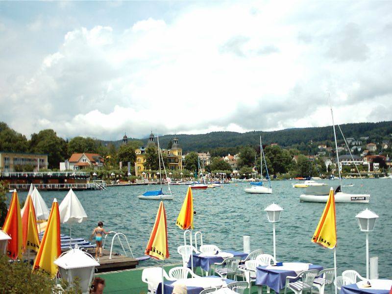 Seepromenade von Velden am Wörthersee, gelbes Gebäude ist das Schlosshotel aus der Serie "Ein Schloss am Wörther See"